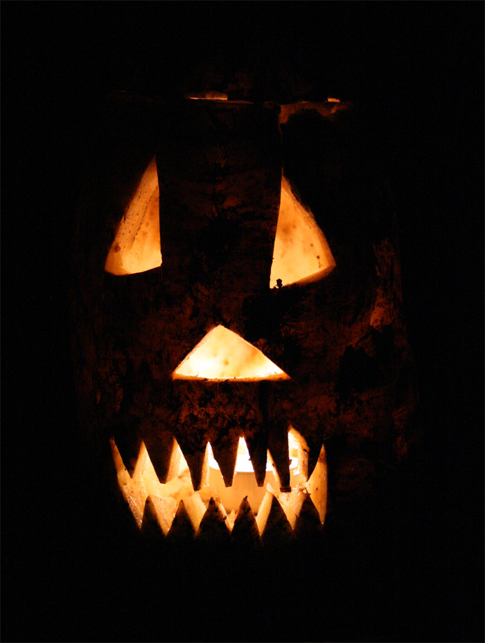 E lëtzebuergescht Trauliicht, aus enger Rommel geschnëtzt.